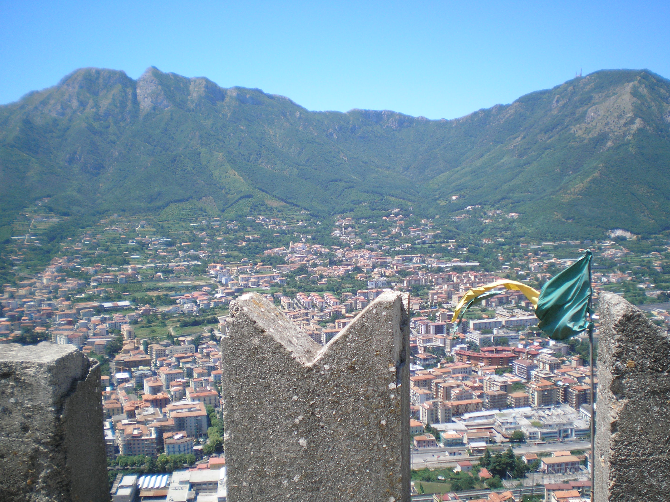 Cava Dei Tirreni vista dal castello (foto di peppeilpazzo di Angri)